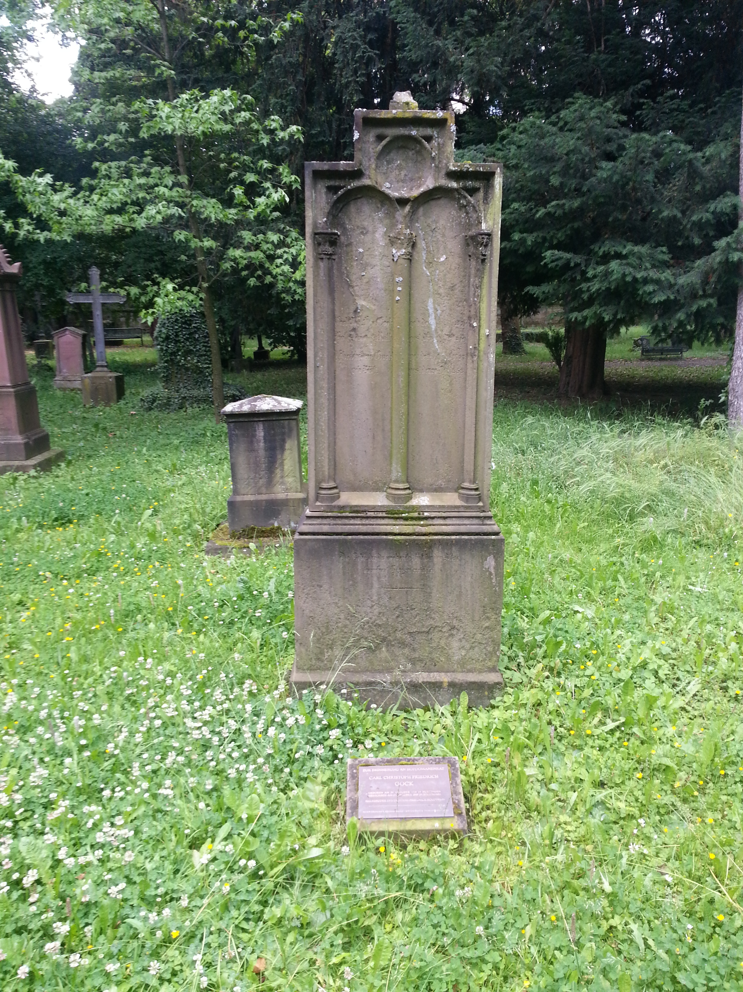 Grab von Karl Christoph Friedrich Gock, Stuttgart, Hoppenlaufriedhof, Abteilung 7a, nahe dem Grab von Gustav Schwab. Grabmalinschrift: Carl Chr. Fr. Gock geb. den ... / Hof-Domänen Rath gest. den ... / Eberhardine Gock / geb. den ... [17]77. / geb. Blöst. gest. den 28. ... [18]53. Sockelinschrift: Die Liebe die du verbreitet hat dir den Altar / in unseren Herzen errichtet.